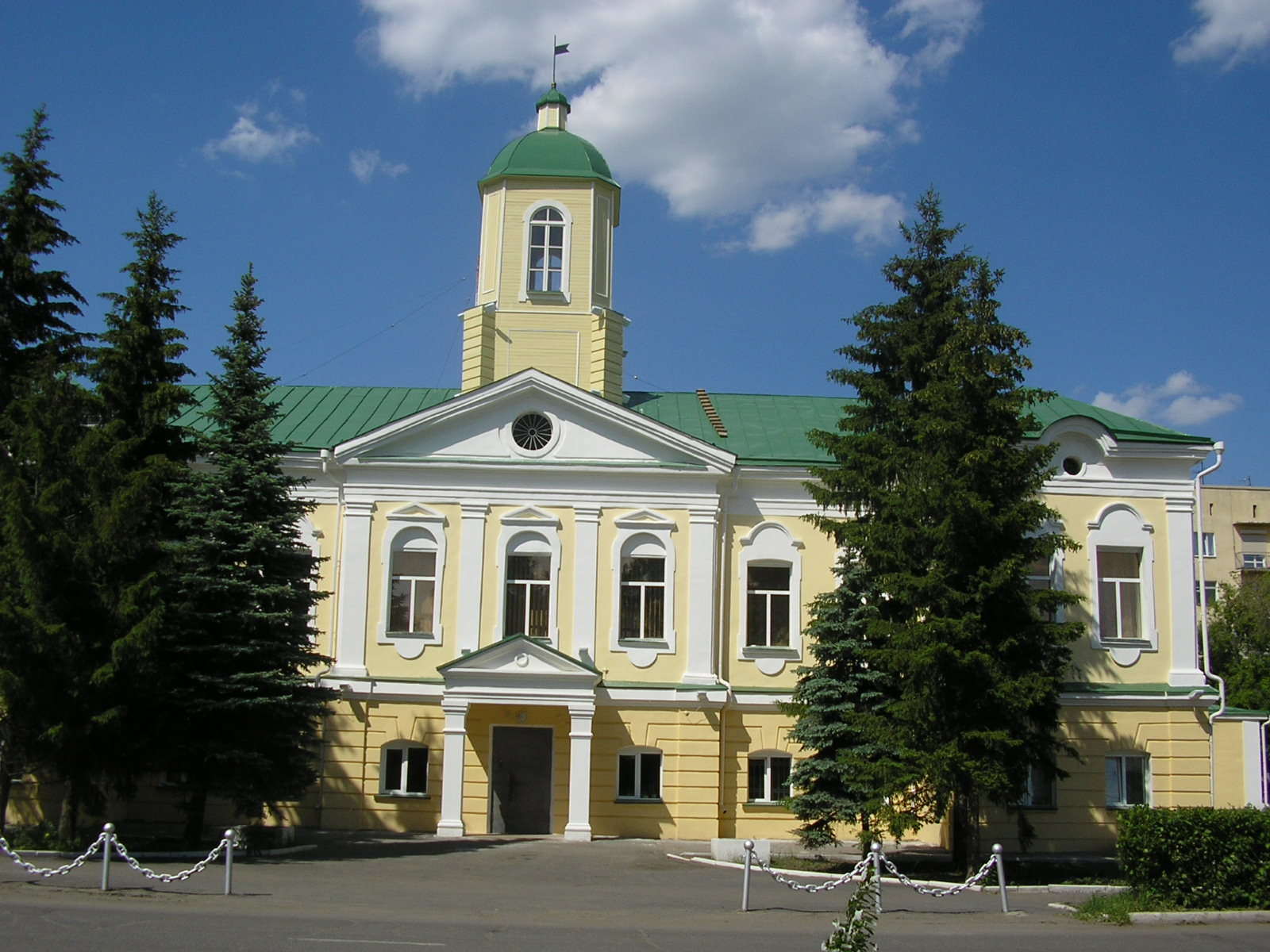 Омск, здание бывшей гауптвахты (Омская крепость), сейчас размещается областной военкомат